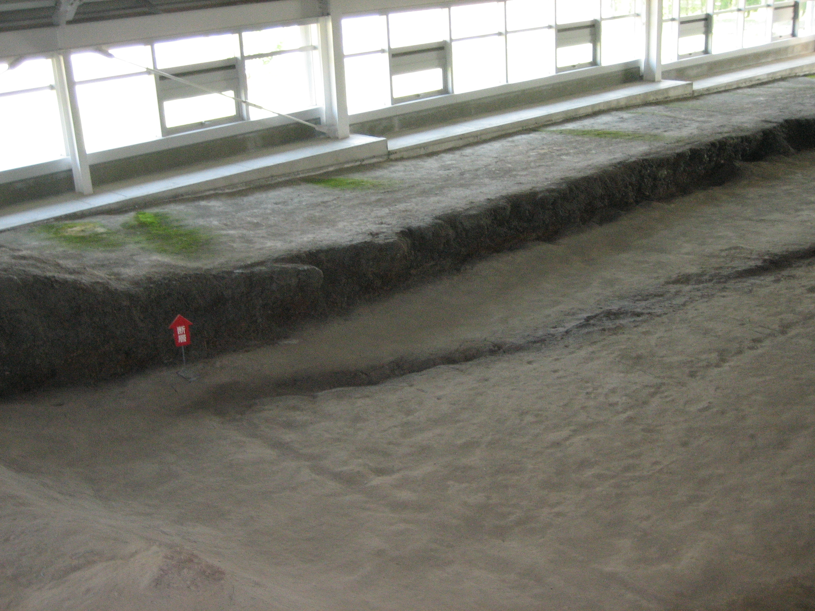 Nojima fault in Nojima, Awaji, Hyogo, Japan